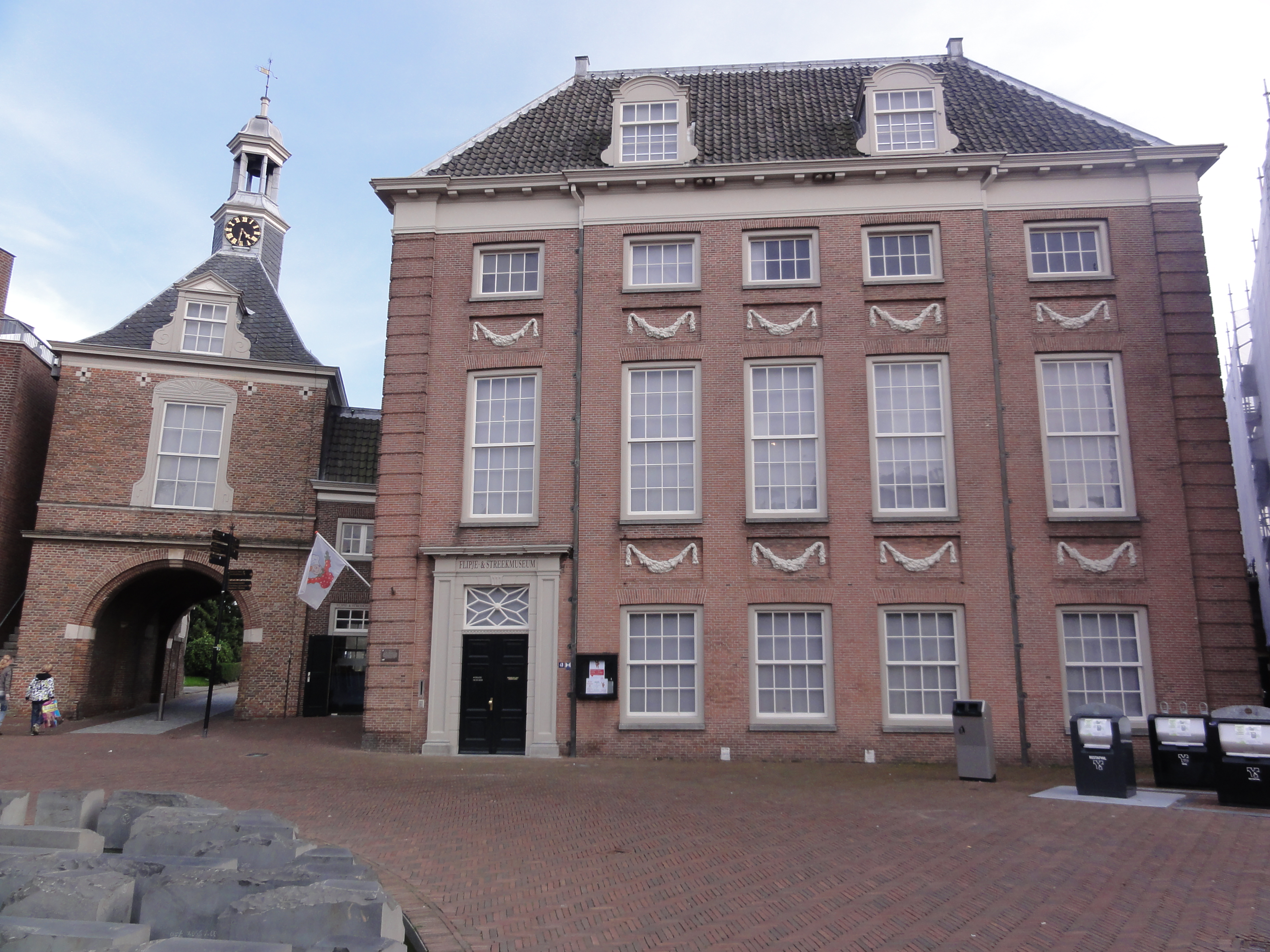 Tiel Rijksmonument 35585 Plein 46, de Sociëteit, nu museum 07″ N, 5° 26′ 14.55″ E